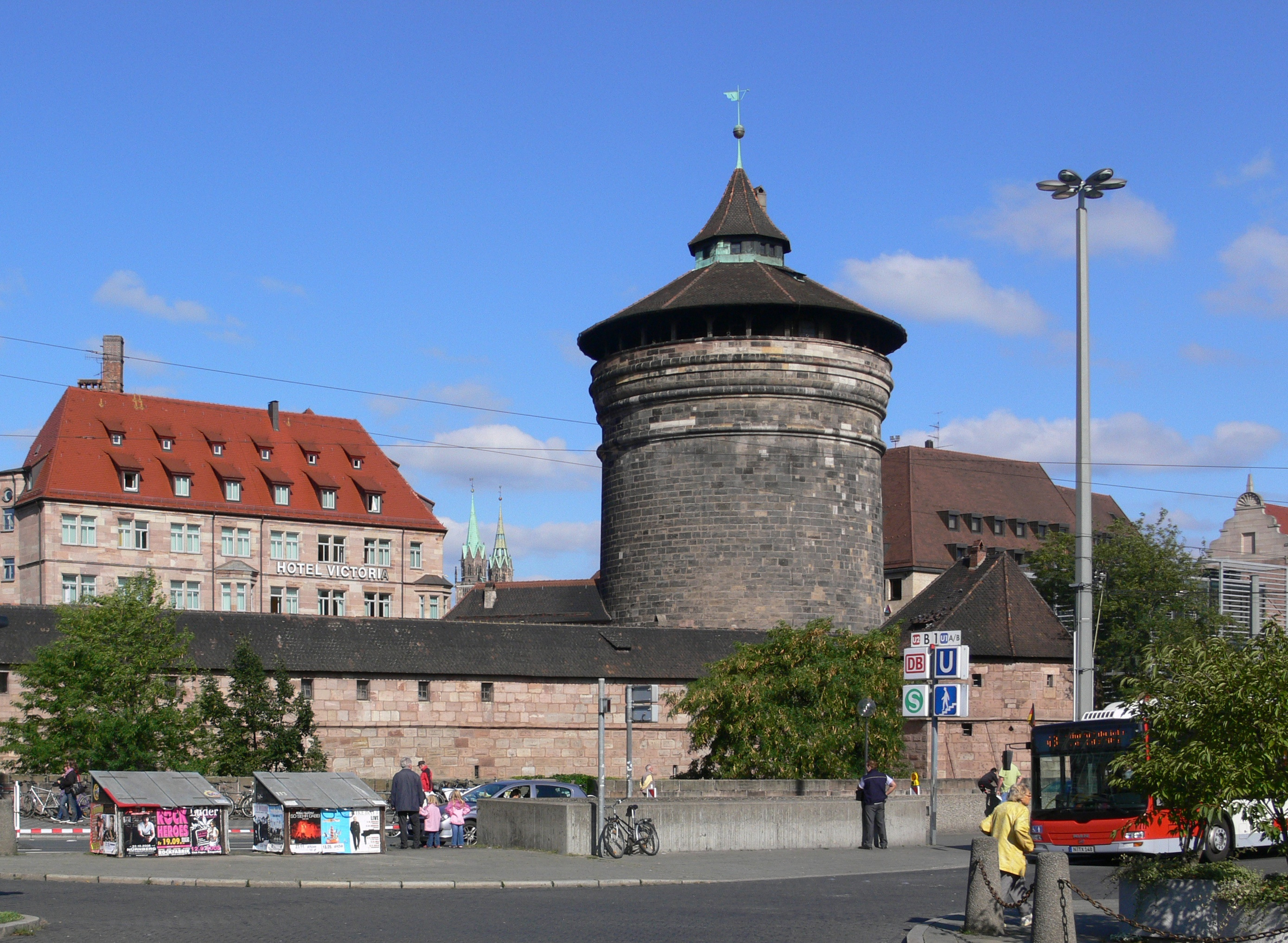 Nürnberg, Königstorturm (betrachtet von außerhalb der Stadtmauern)